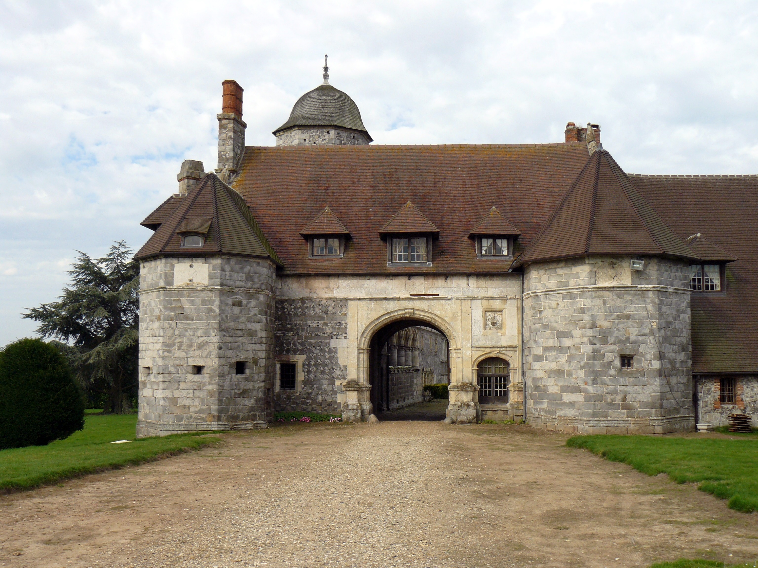 Manoir d'Ango (Varengeville-sur-Mer, Seine-Maritime, France) : l'entrée